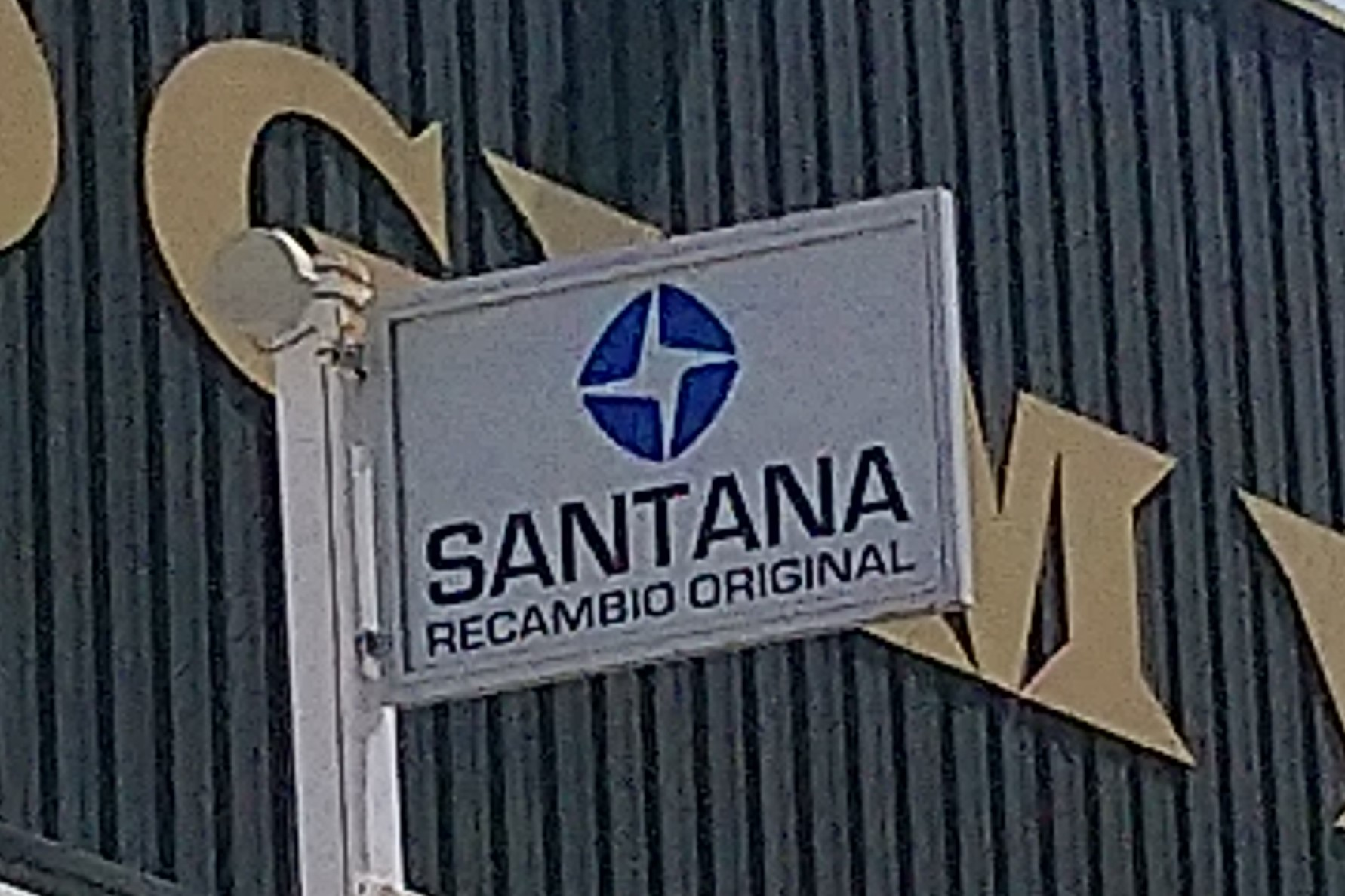 Cartel repuestos de Santana